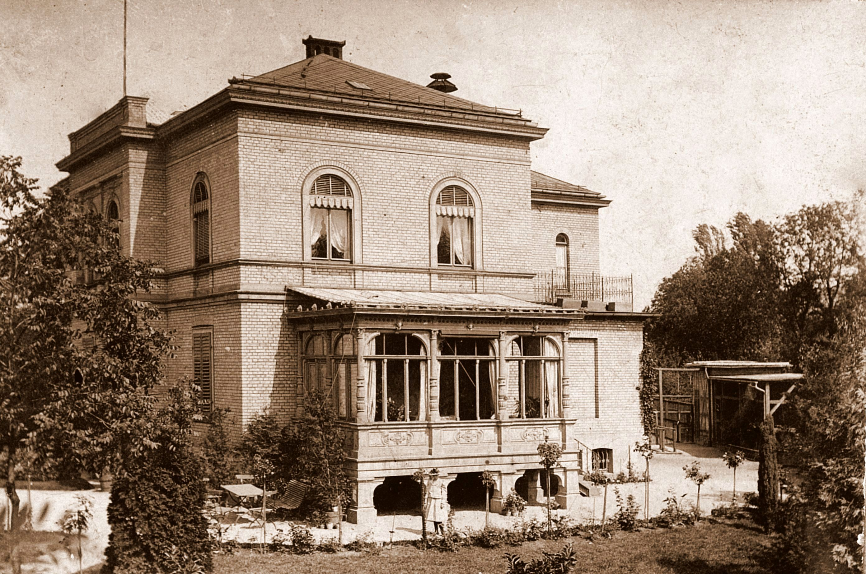 Die 1881 erbaute Stadtvilla des Großherzoglich-Sächsischen Kommerzienrats und Brauereidirektors Albert Erbslöh in der Eisenacher Goethestraße. Später Teil der Tagesklinik für Psychiatrie und Psychotherapie des St. Georg-Klinikums Eisenach